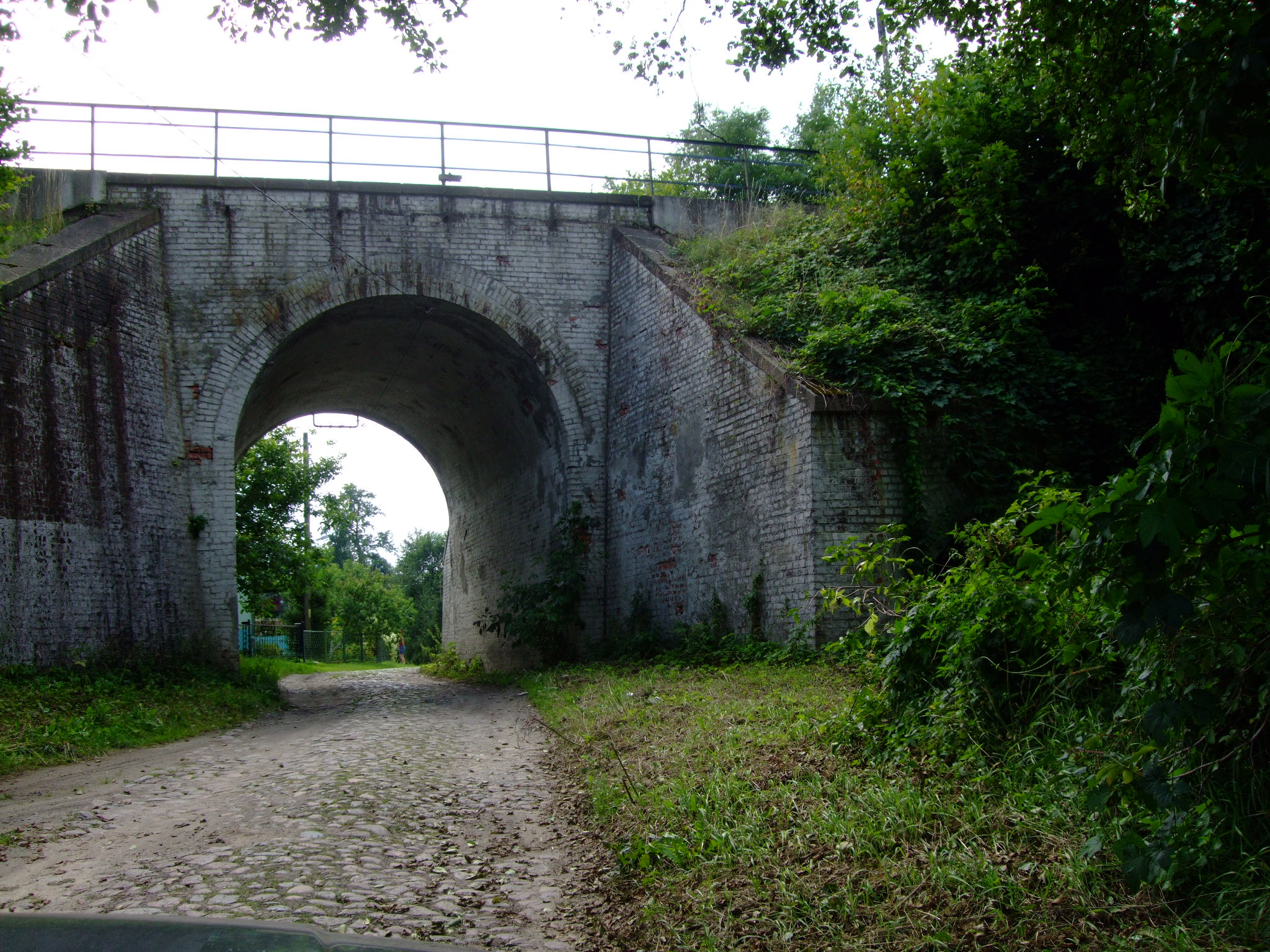 Most kolejowy w Dębince.